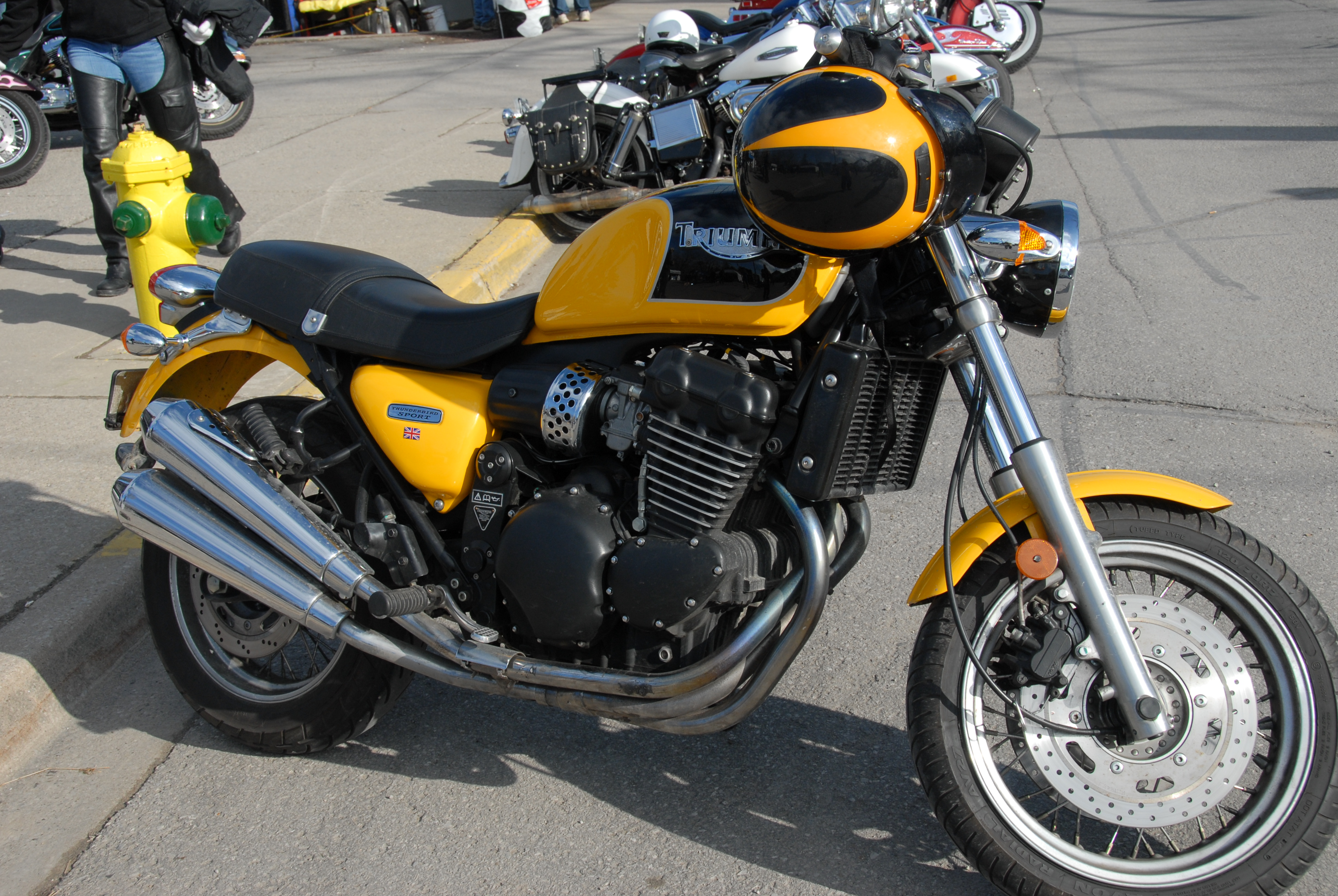 Triumph Thunderbird Sport